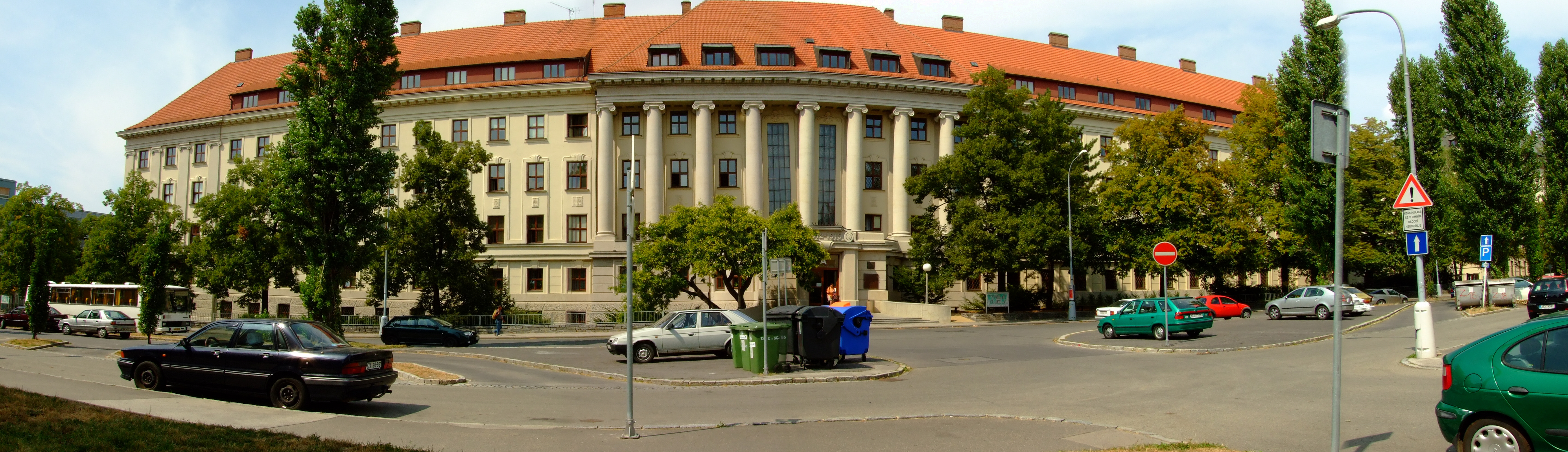 Brno-Černá Pole - panorama Mendelovy lesnické a zemědělské univerzity